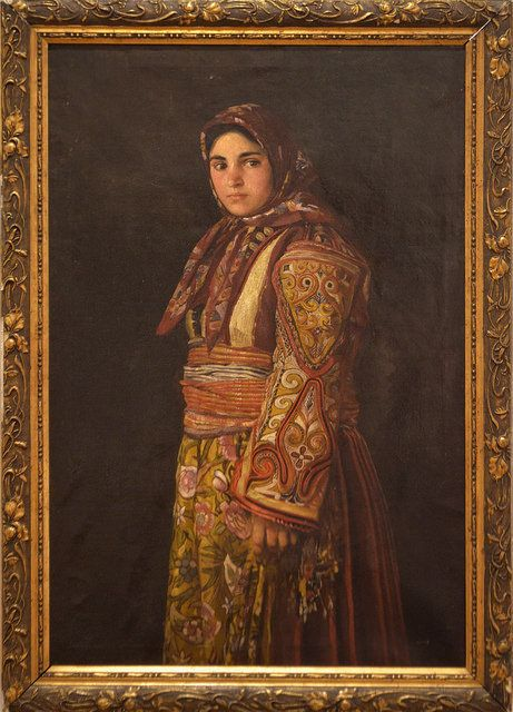 Радка Хаджиниколова в македонска носия.